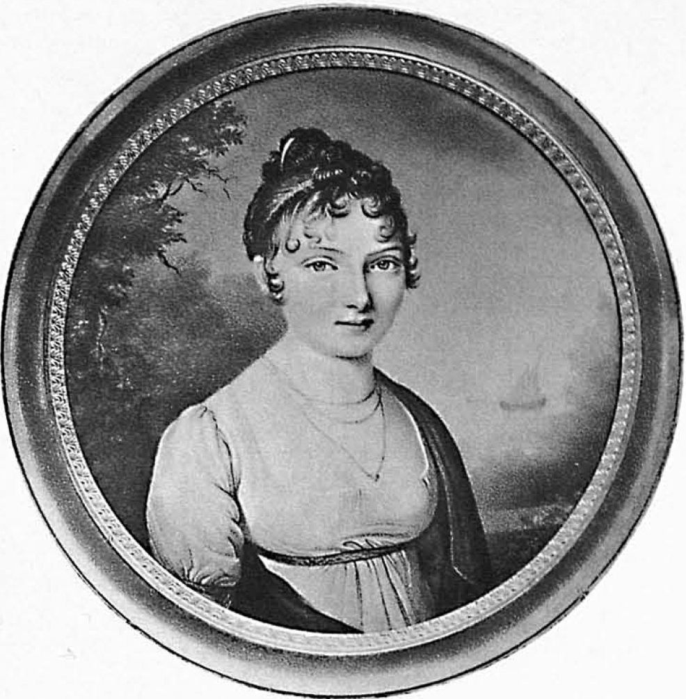 Баронесса Юлия Крюдинер (1764-1824)